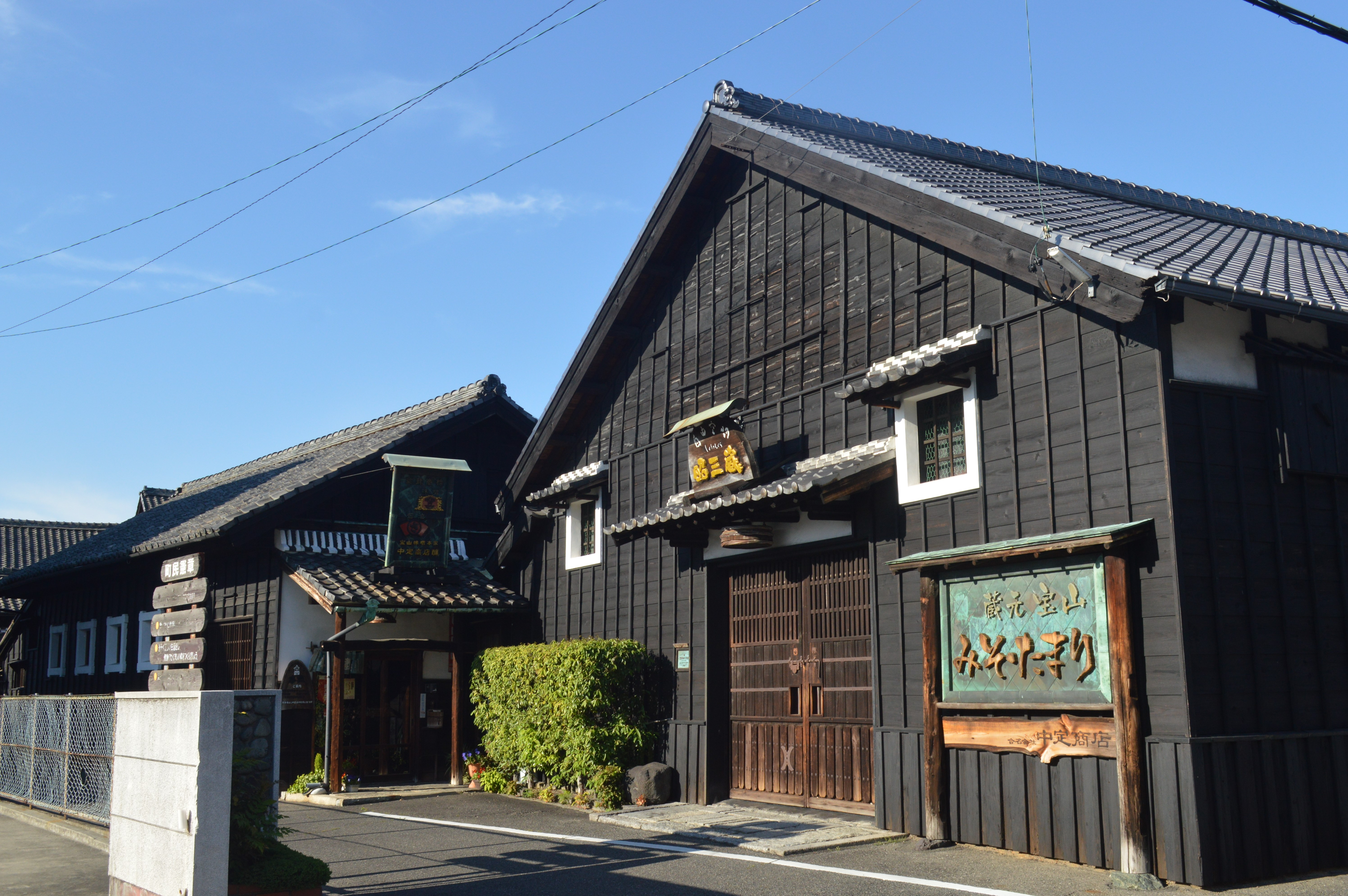 愛知県知多郡武豊町字小迎51にある合名会社中定商店。登録有形文化財。